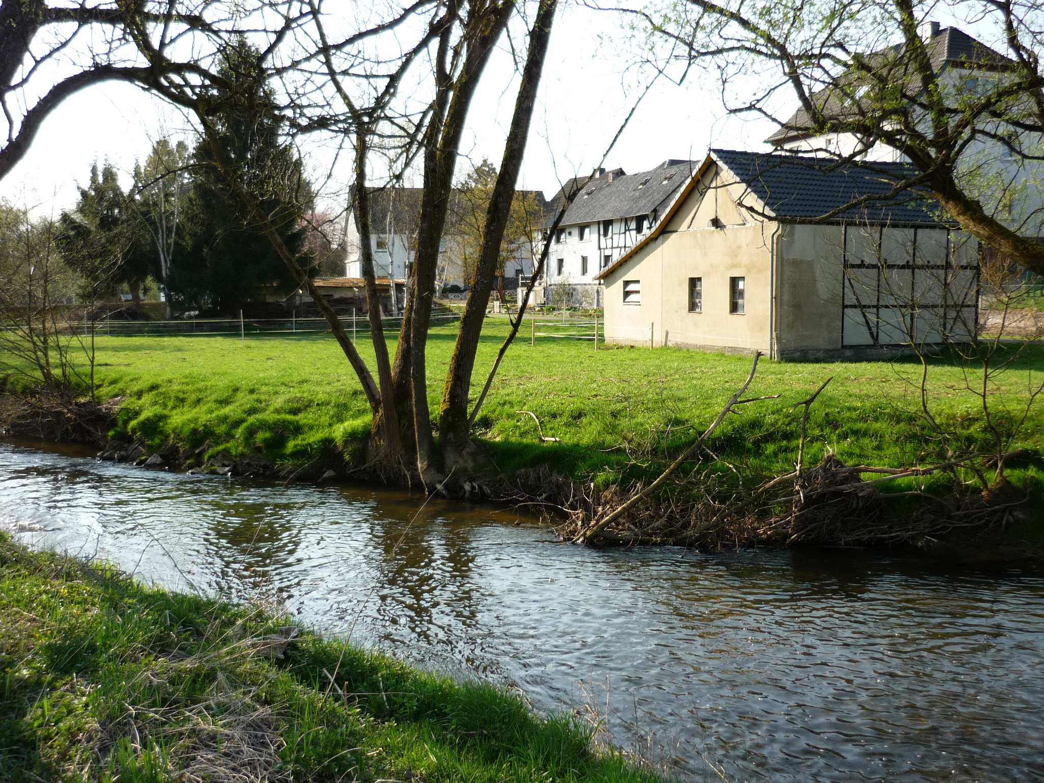 Wied bei Michelbach/Westerwaqld